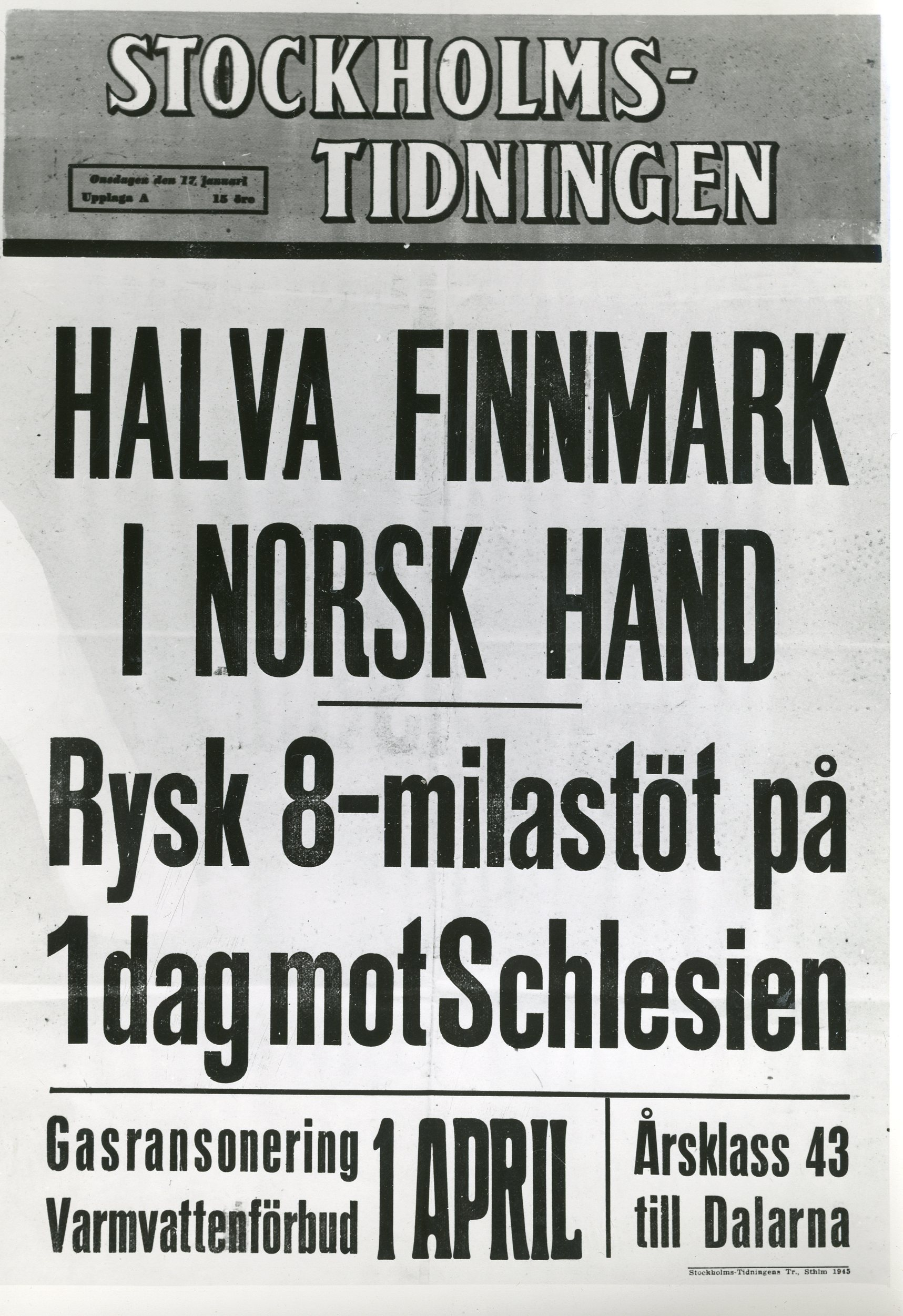 Stockholmstidningen overskrift: Halva Finnmark i norsk Hand. RA/PA-1209/Uc/66/7/Uten nummer